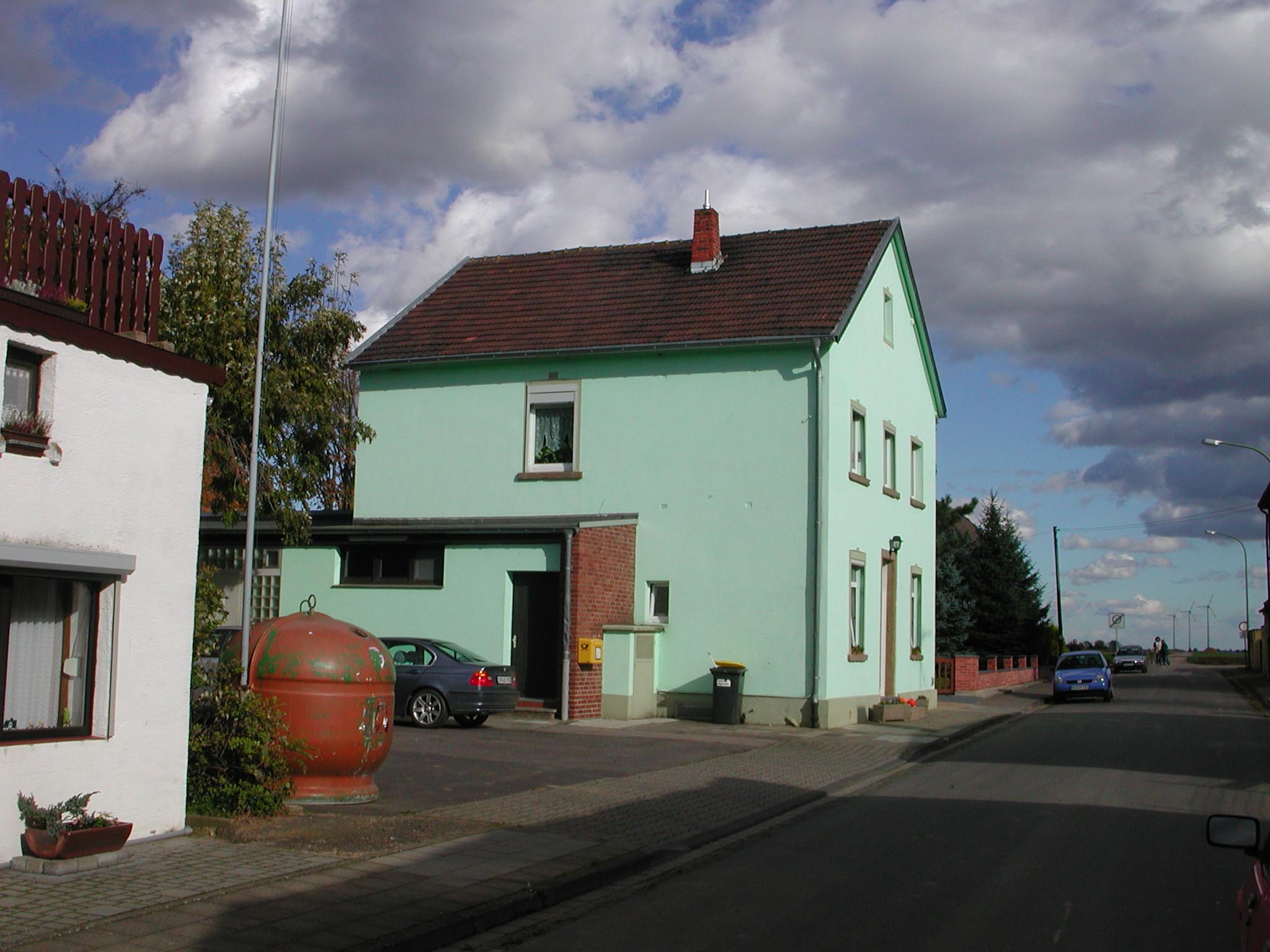 Die salte Schule